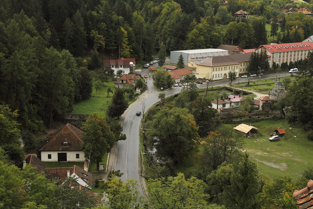 Ansamblul vămii Branului